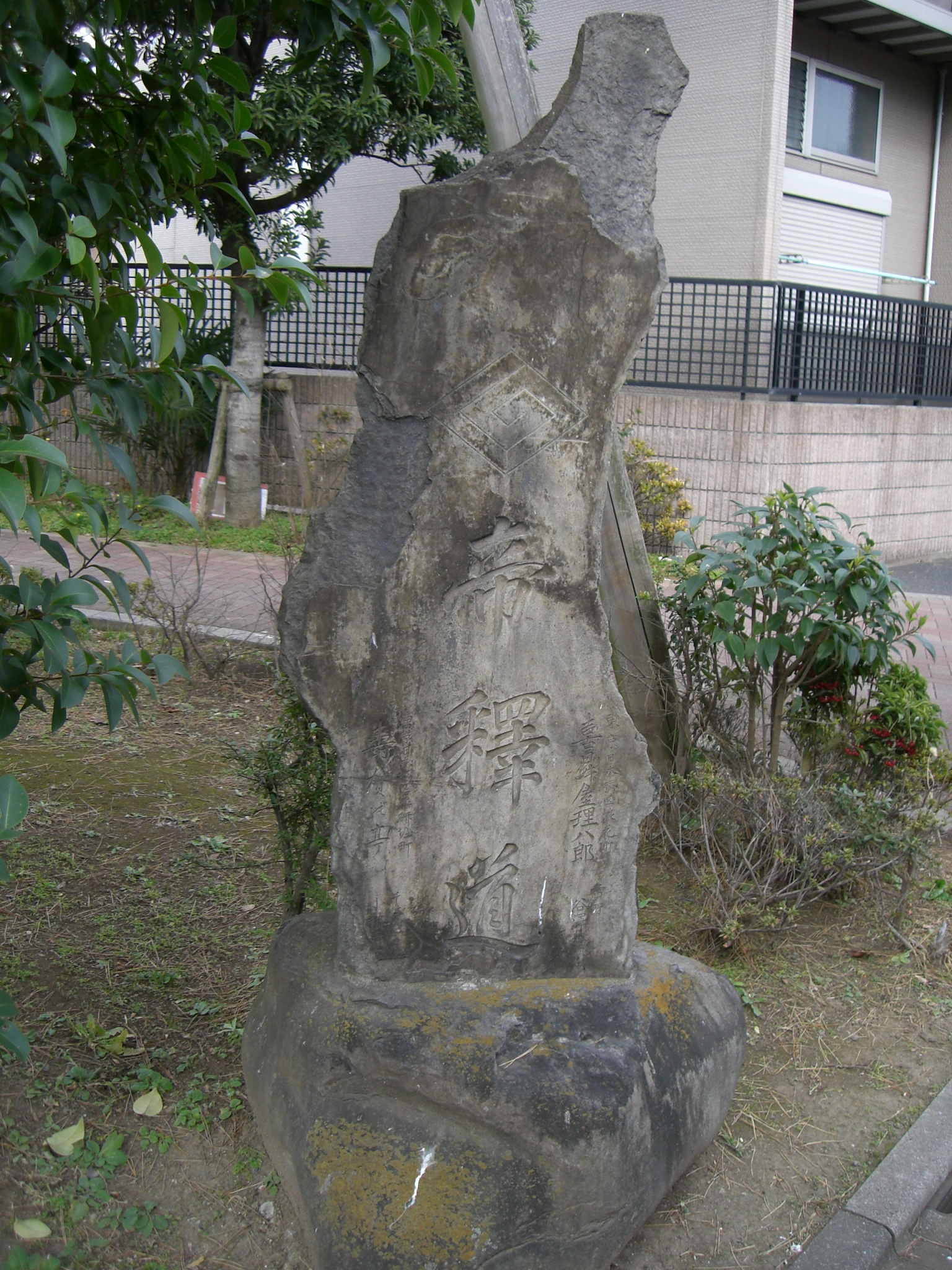 帝釋道追分石碑